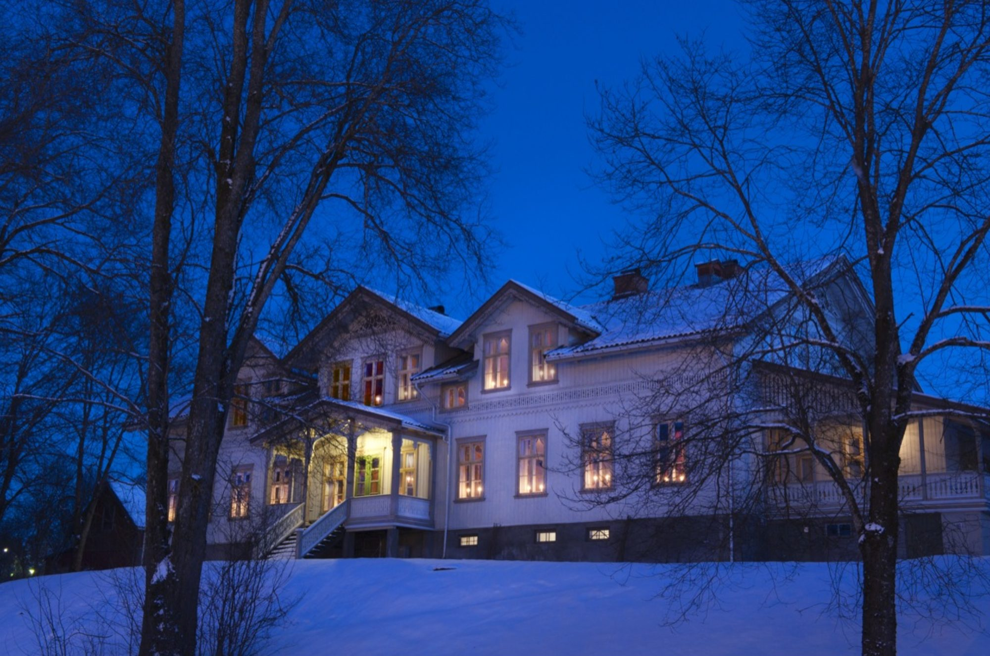 Hovedbygningen på Nor